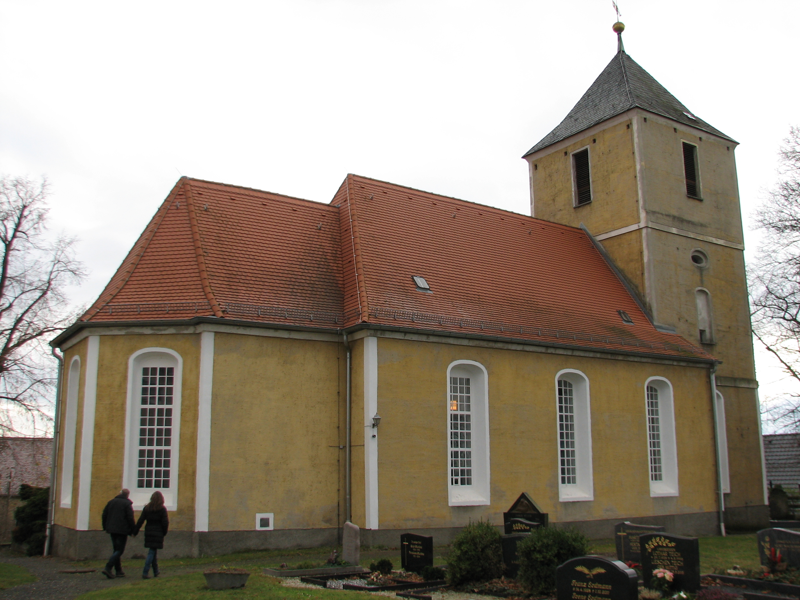 Ansicht vom Friedhofsportal